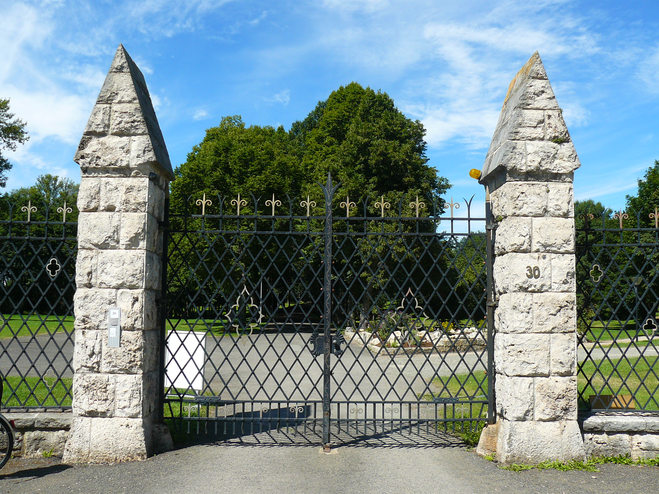 Eingangstor an der Gothaer Straße